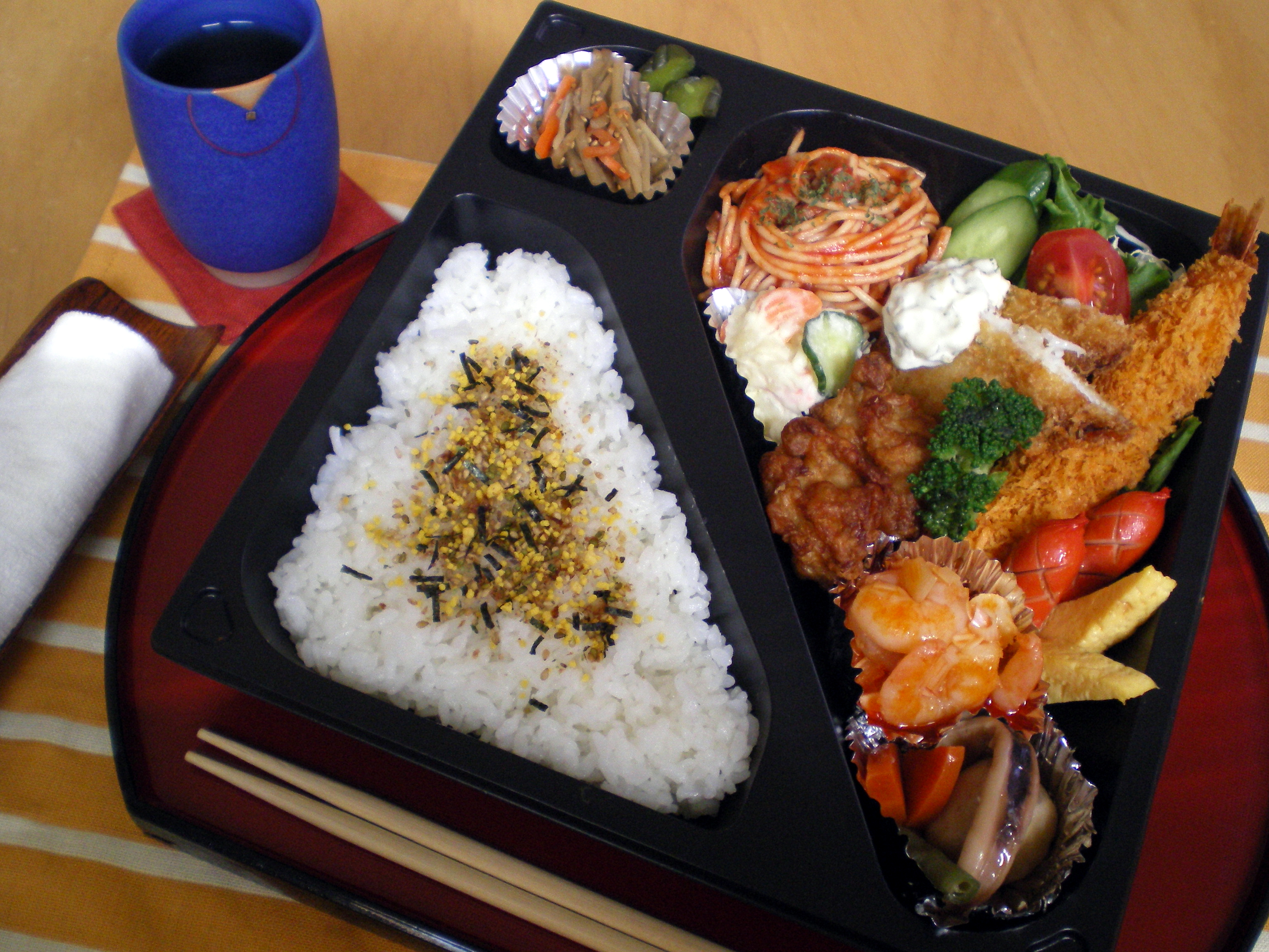 幕の内／加賀一乃膳